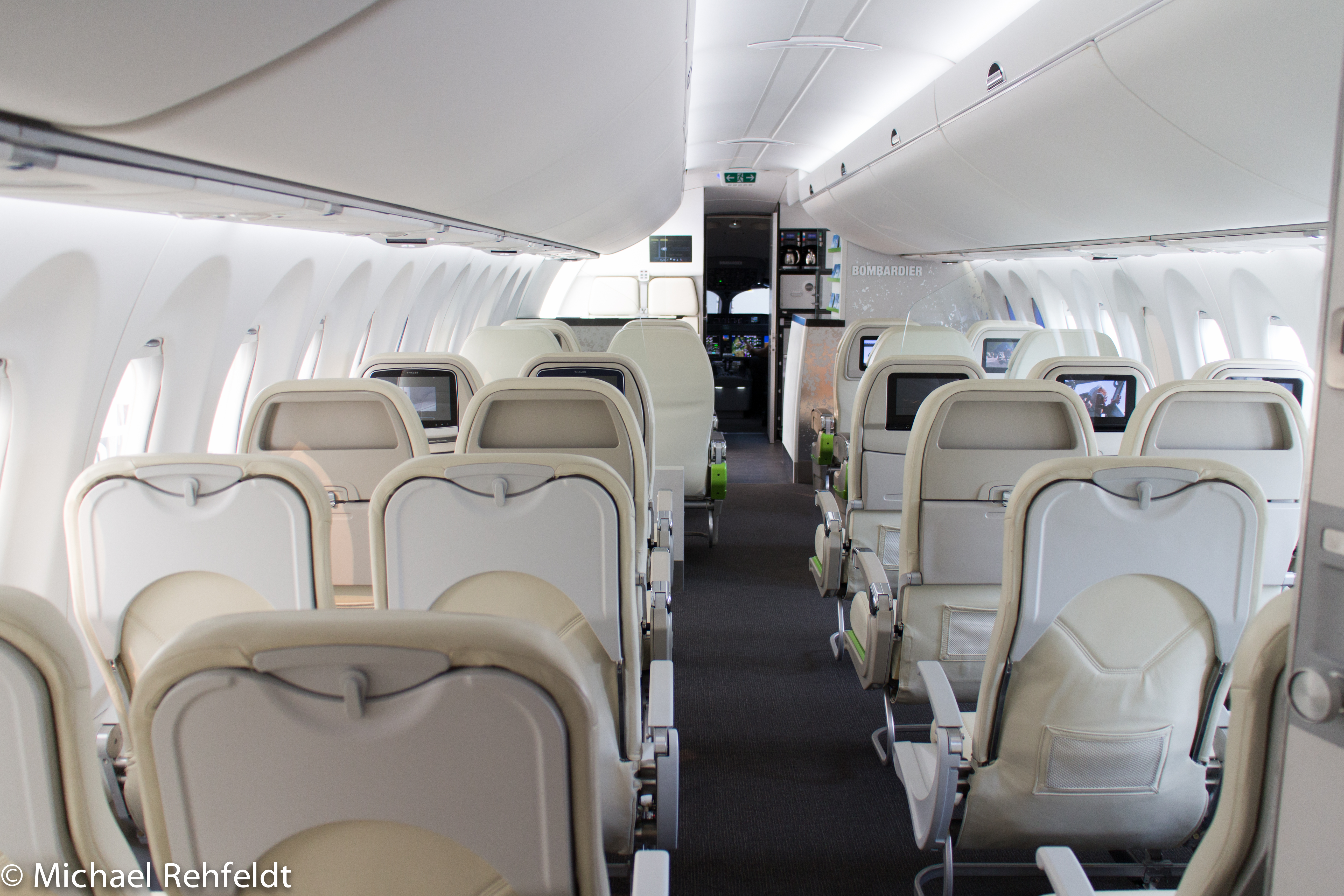 CSeries-2.jpg